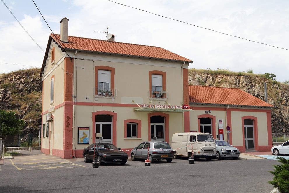 La gare de Banyuls-sur-Mer en juin 2013, Languedoc-Roussillon, France.